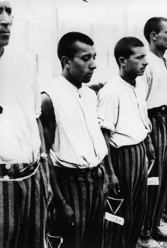 Dachau, Konzentationslager Schutzhaftlager Dachau.- Häftlingsappell.